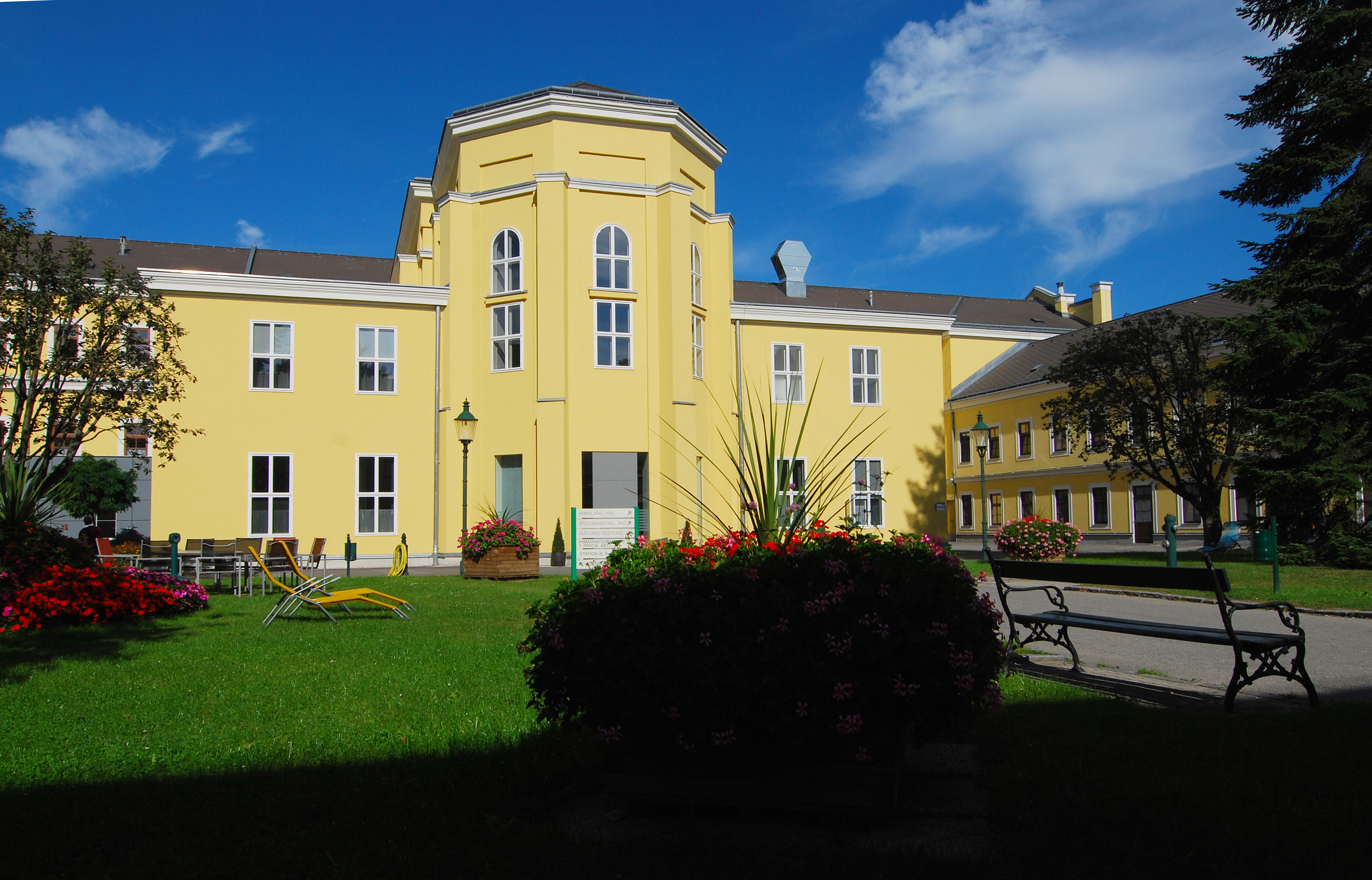 Innenhof des Haus 1 mit Blick auf die Hauptküche im Therapiezentrum Ybbs.